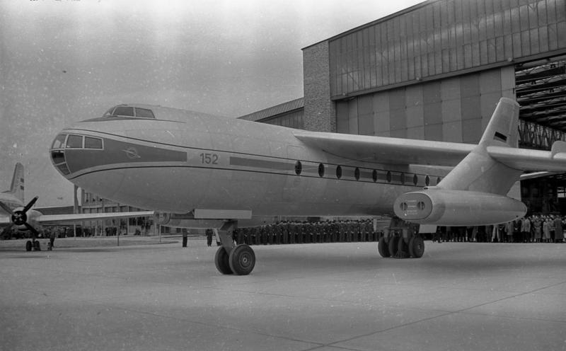 Zentralbild / Loewe / 1.5.1958 / Walter Ulbricht auf der Kundgebung bei den Dresdner Flugzeugbauern Unter den festlichen Klängen eines Orchesters und dem Jubel vieler tausend Arbeiter, Ingenieure und Angestellter der volkseigenen Luftfahrtindustrie öffnete sich am 30.4.1958 das riesige Tor der Montagehalle der Flugzeugwerke Dresden, aus der sich der silberne Leib des hallenfertigen Strahlturbinenverkehrsflugzeuges "152" heraus bewegte. In Gegenwart des 1. Sekretärs des ZK der SED Walter Ulbricht, teilte der Direktor der Flugzeugwerke, Rentsch, den Teilnehmern der Kundgebung mit, das damit der gestellte Kampftermin zur Fertigstellung dieser Maschine erfüllt worden ist. UBz: Das Strahlturbinenverkehrsflugzeug "152". Information added by Wikimedia users.